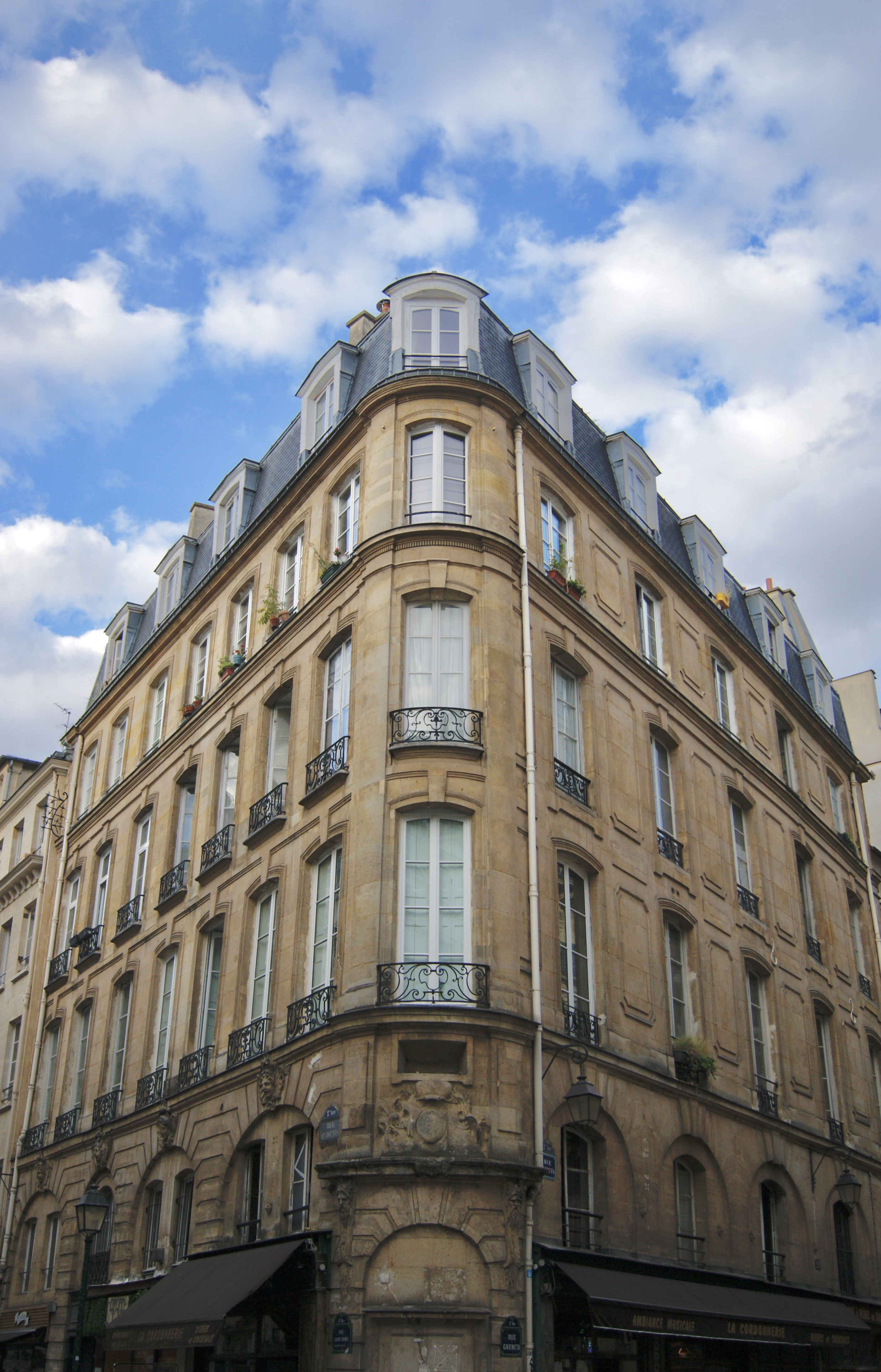 Immeuble du 142 rue Saint-Denis/28 rue Greneta, et la fontaine Greneta.